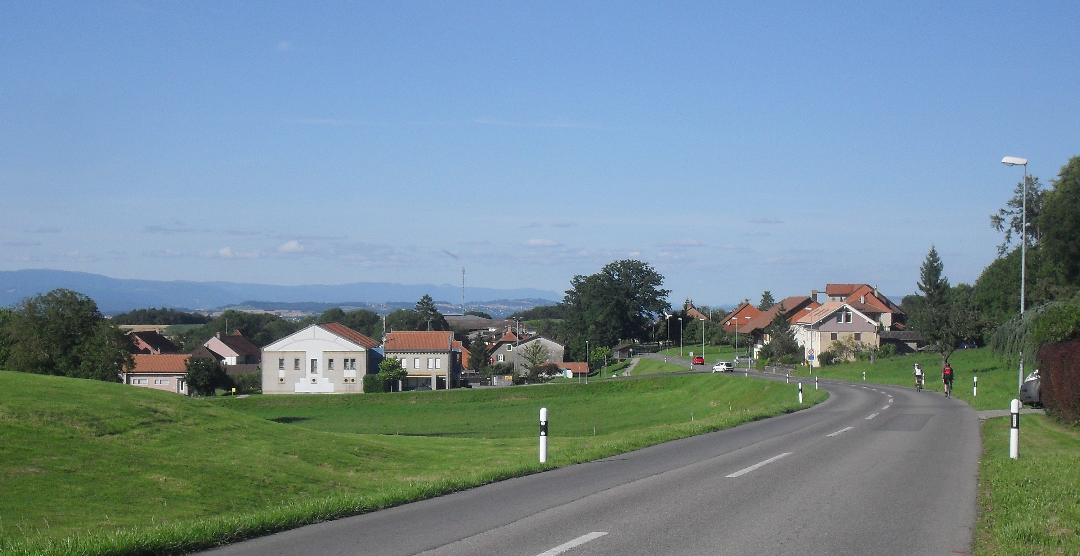 Vue d'Aumont